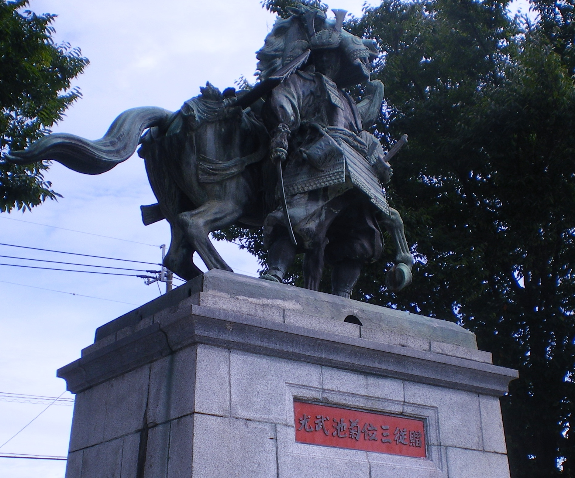 菊池武光像（太刀洗）